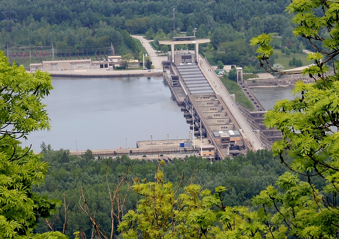 Das Kraftwerk Greifenstein von Süden gesehen (von der Tempelbergwarte). Einsehbar: Eine der beiden Schleusen (zweite ist vom Wald verdeckt), anschließend die 6 Wehrfeldern und das Maschinenhaus mit den 9 Maschinensätzen.